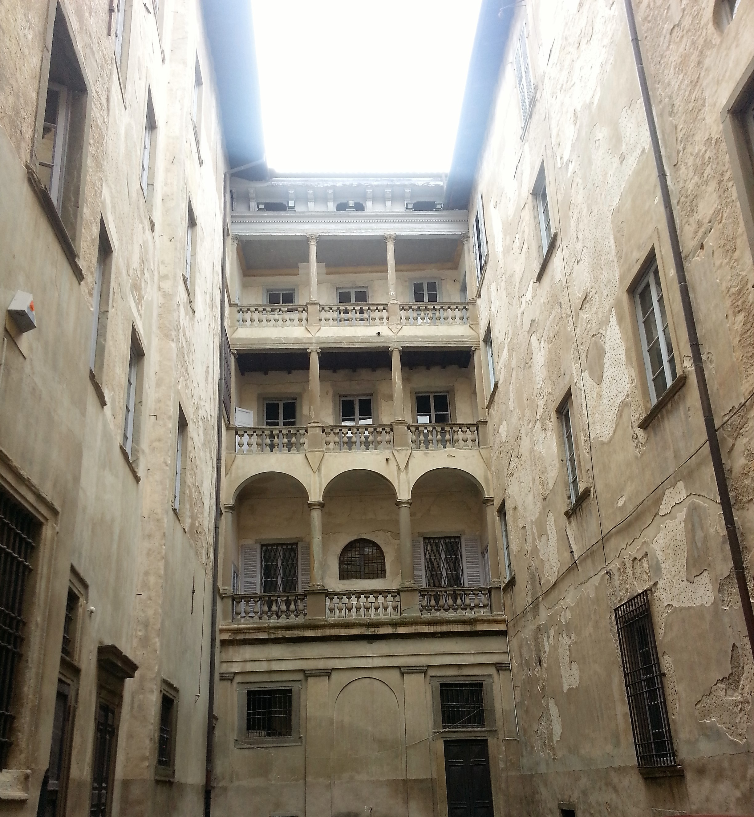 Loggia dell'Urbai e cortile interno della Fondazione MIA, sede del Museo di Gaetano Donizetti